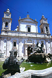 La cattedrale di Santa Maria la Nova a Caltanissetta. from the english wikipedia